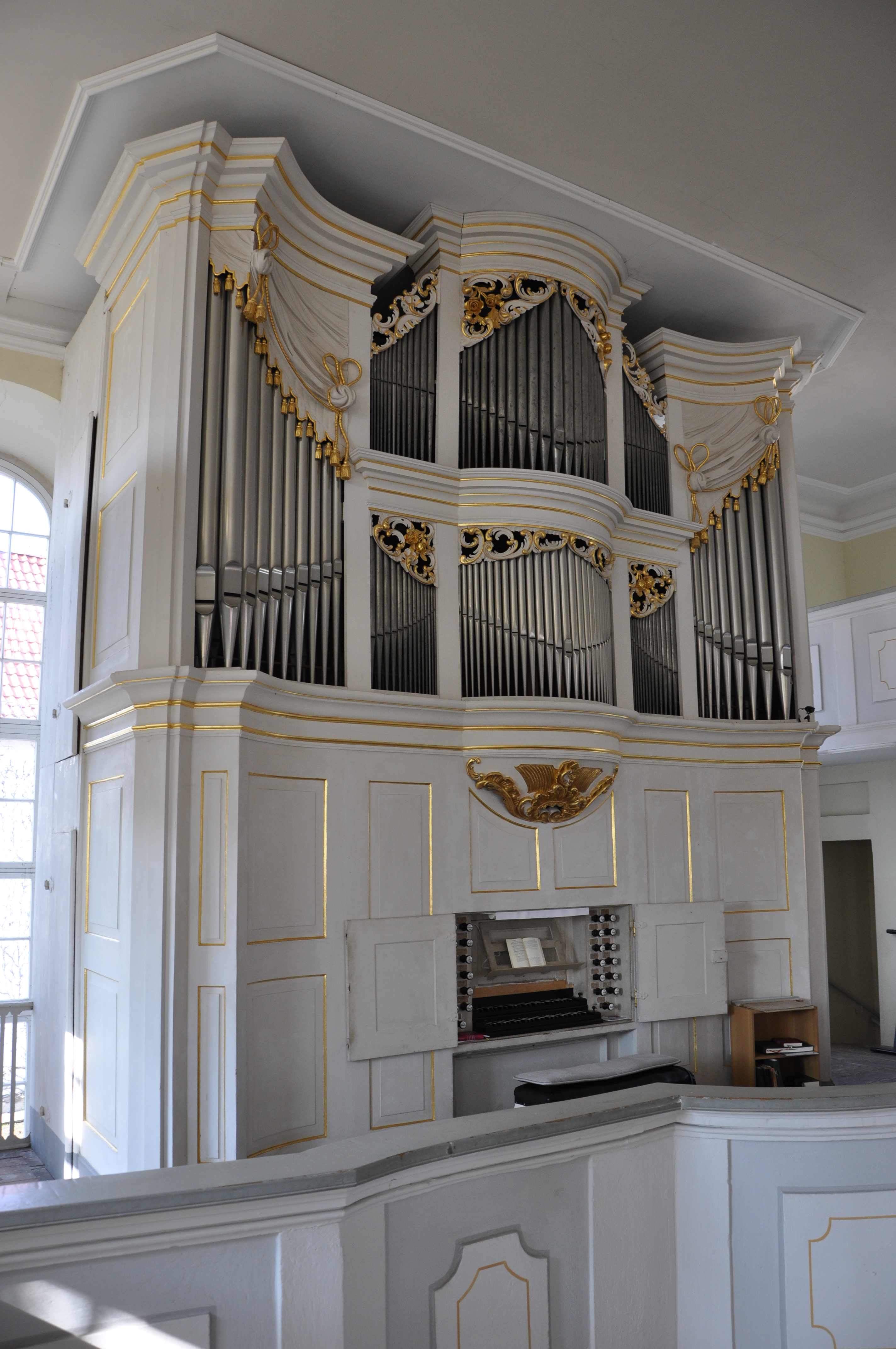 Trampeliorgel in der Pfarrkirche Oberlosa